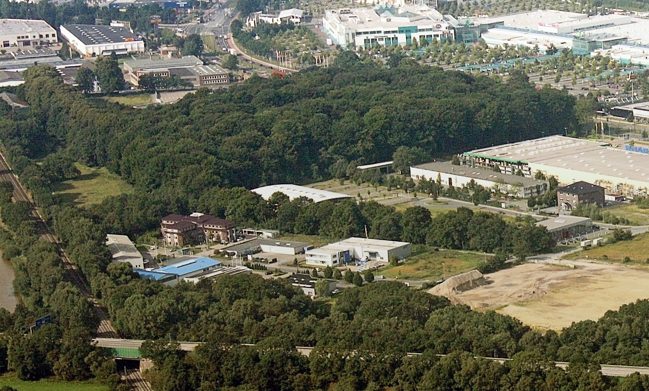 Luftaufnahme Bremen; entlang der A1 (auf der Südseite) vom Bremer Kreuz bis zum Weserpark (Blick aus der linken Flugzeugseite) - Kreisen über dem Bremer Kreuz und überdem Weserpark